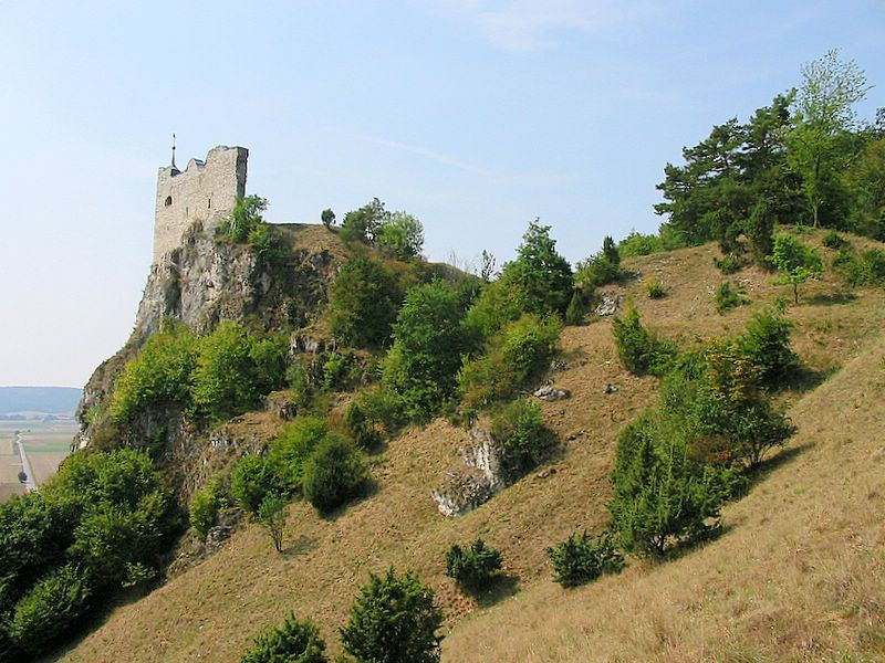 Burg Hütting (Markt Rennertshofen, Landkreis Neuburg-Schrobenhausen, Oberbayern). Ansicht von Nordwesten. Eigene Aufnahme, Aug. 2007 / Huetting castle near Rennertshofen (Upper Bavaria, Germany). Total view from north-west. Own photo, Aug. 2007